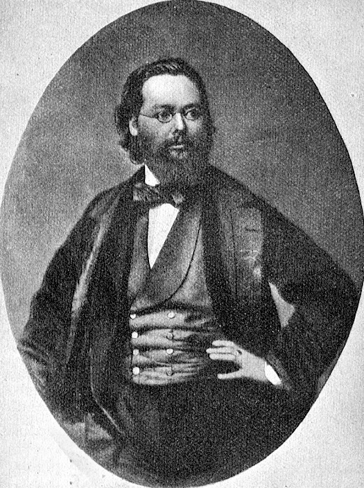 Rudolf Koller (1828–1905) Maler. Fotografie von Franz Hansstaengl, München, 1858.